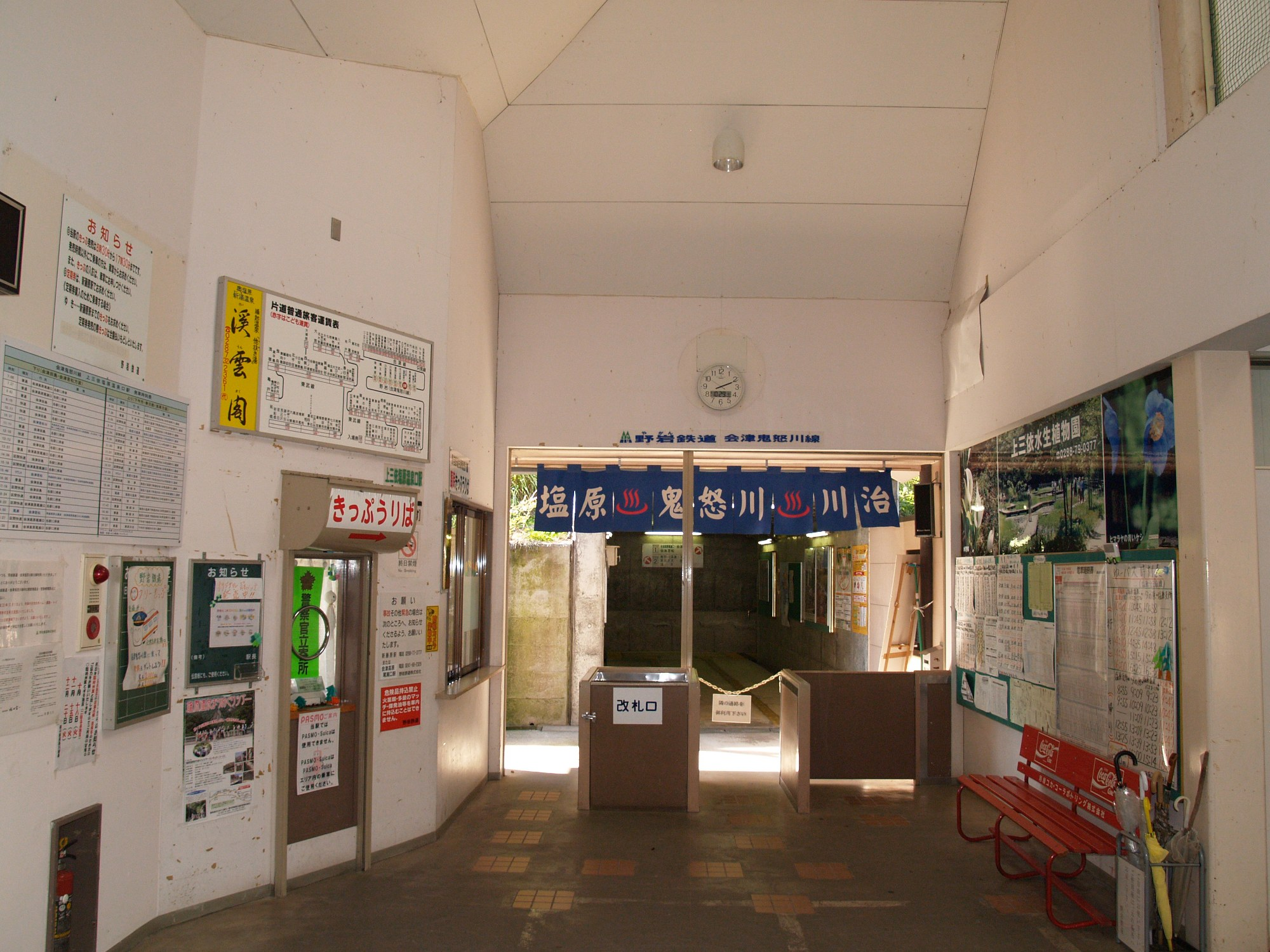 上三依塩原温泉口駅改札口